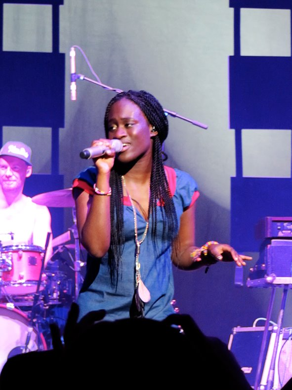 Ivy Quainoo auf ihrer ersten eigenen Tournee beim Konzert in Stuttgart.